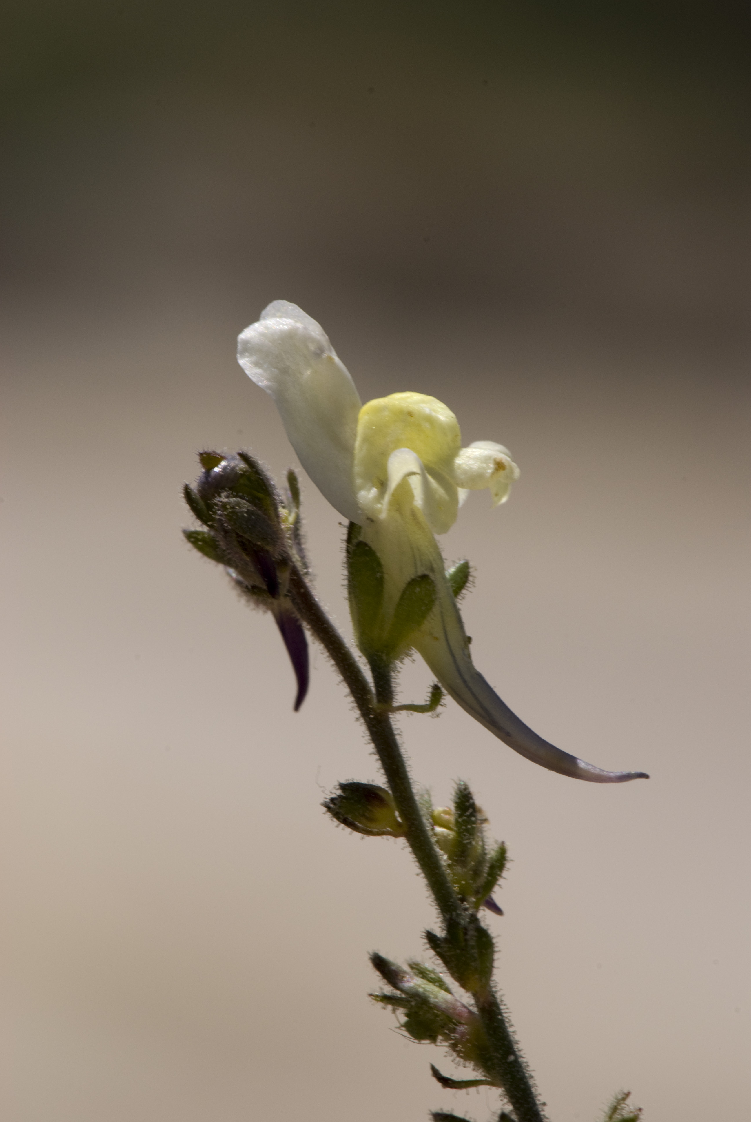 Linaria supina carrières de Saint-Vaast-lès-Mello (Oise), France